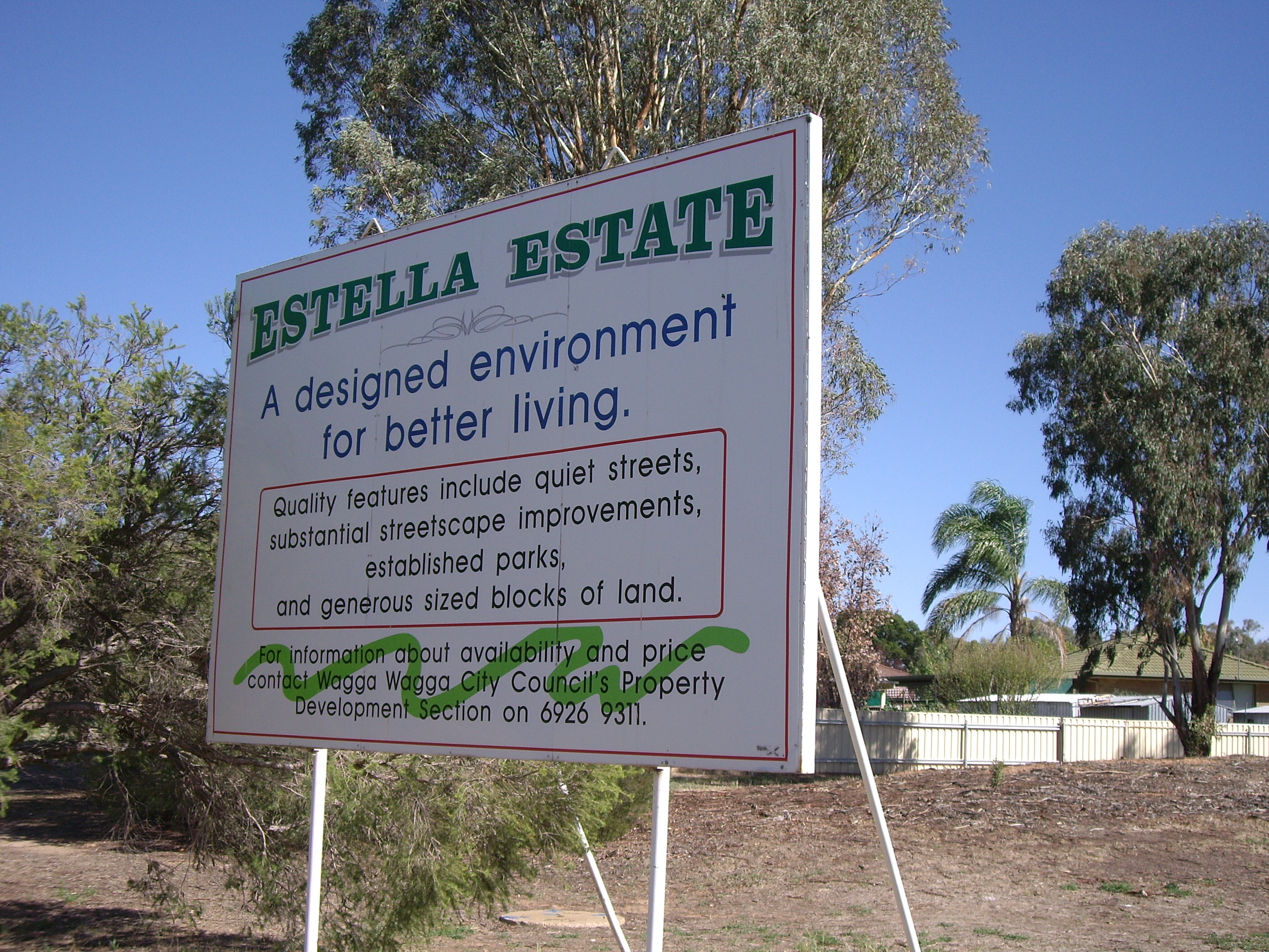 Entering Estella